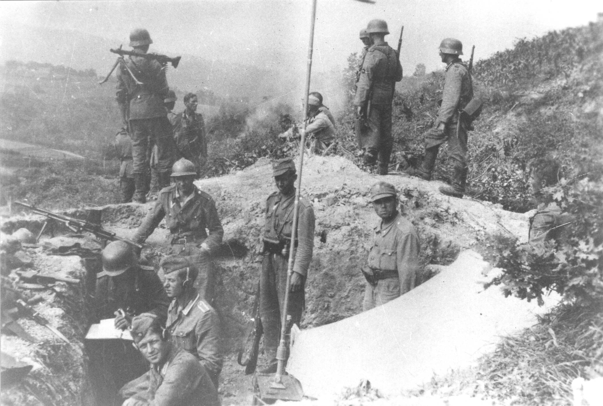 Srpskohrvatski / српскохрватски: Nemački vojnici na utvrđenim položajima spoljne i unutrašnja odbrane Beograda, oktobra 1944. godine.